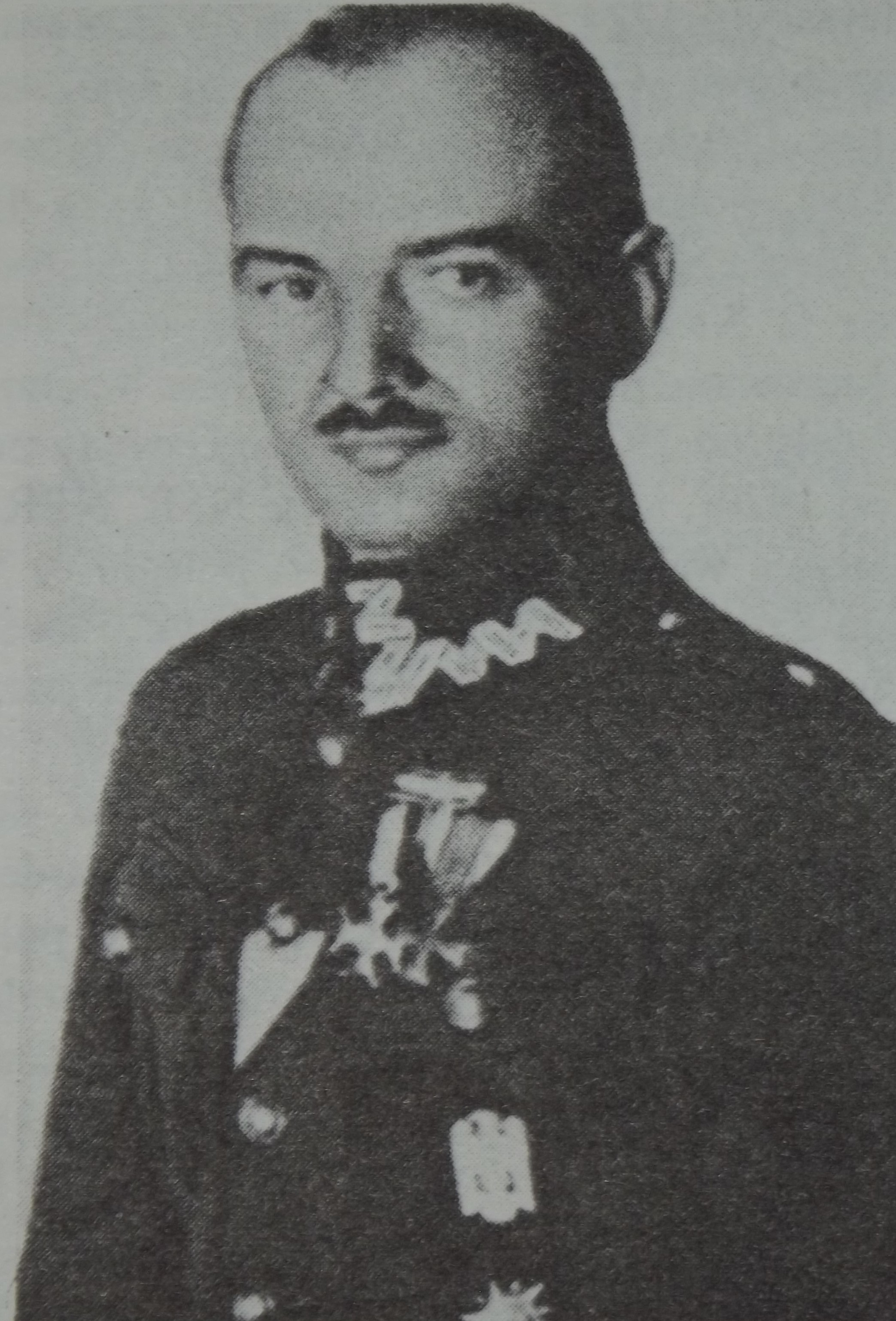 Józef Michalski (ur. 17 lutego 1889)